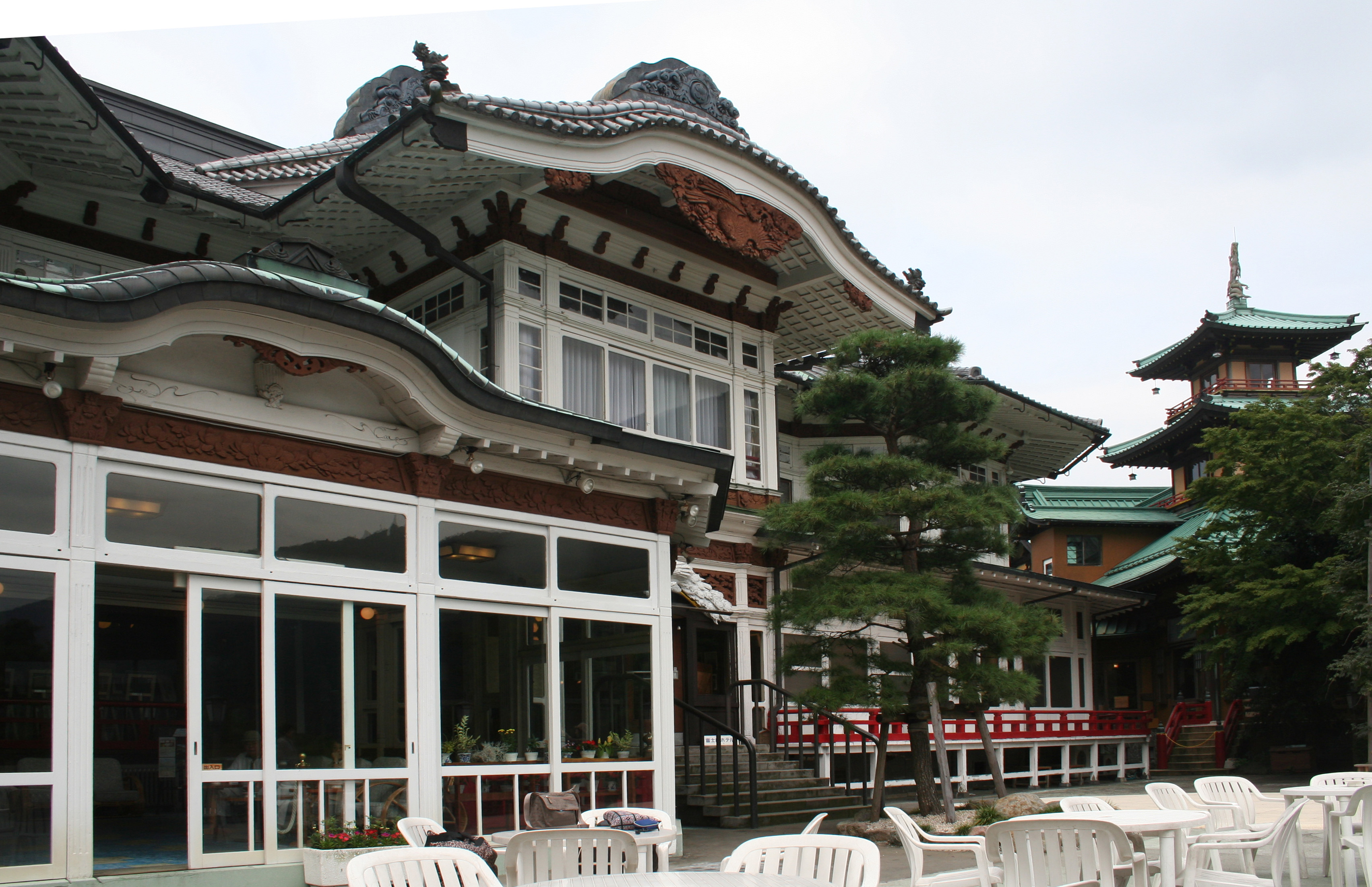 Fujiya Hotel